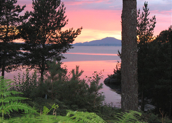 Halsnøy,Kvinnherad, Norway